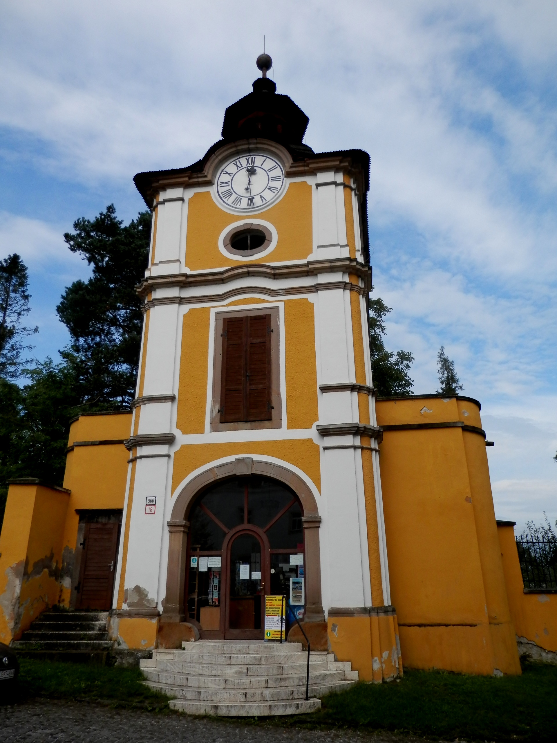 Baroková zvonica s hodinovou vežou je z roku 1739. Dnes v nej sídli informačná kancelária. Spišská Kapitula-Spišské Podhradie, okres Levoča.